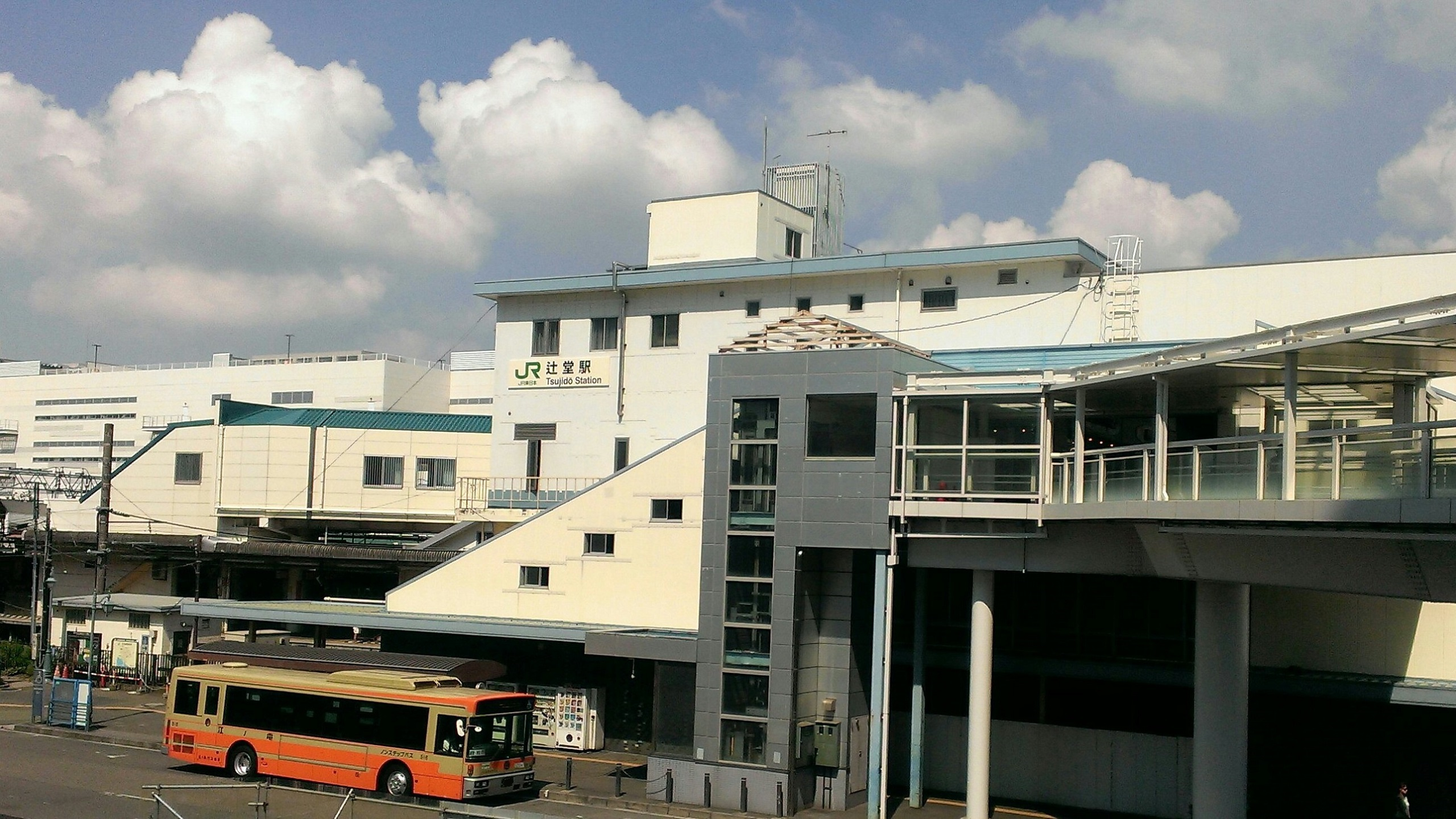 2013年9月13日撮影